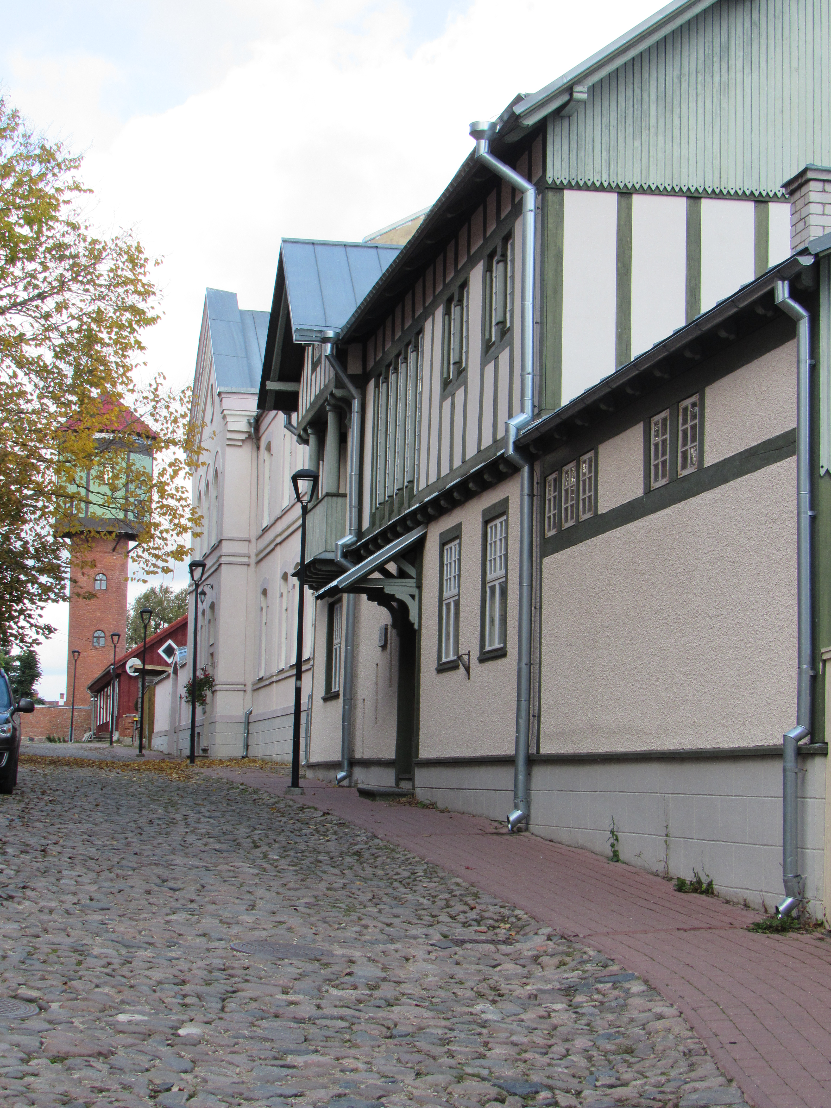 Wohnhaus in Viljandi Lutsu 5 (Villa Engelhardt)